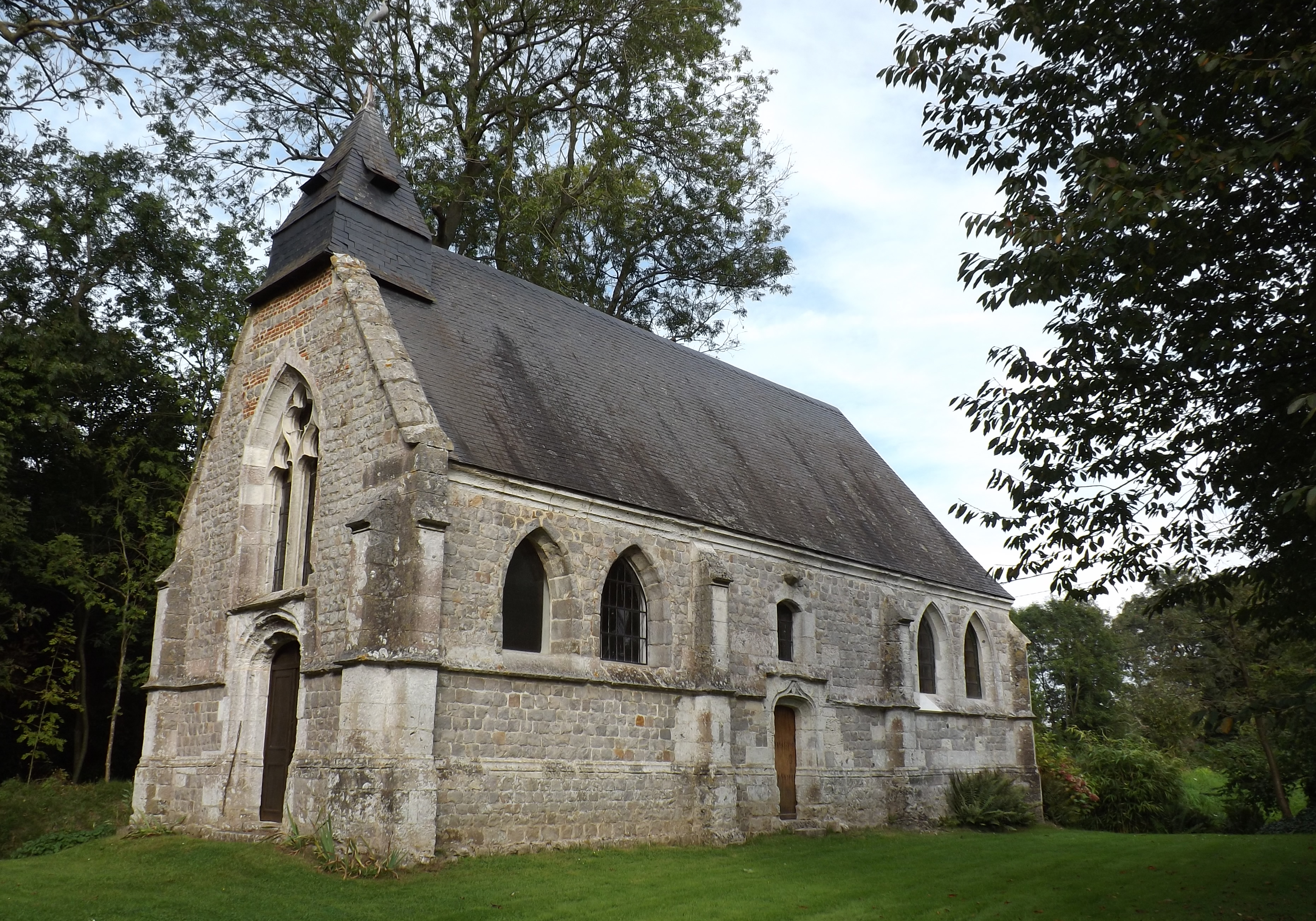 Chapelle Saint-Jean-Baptiste de Pleine-Sevette